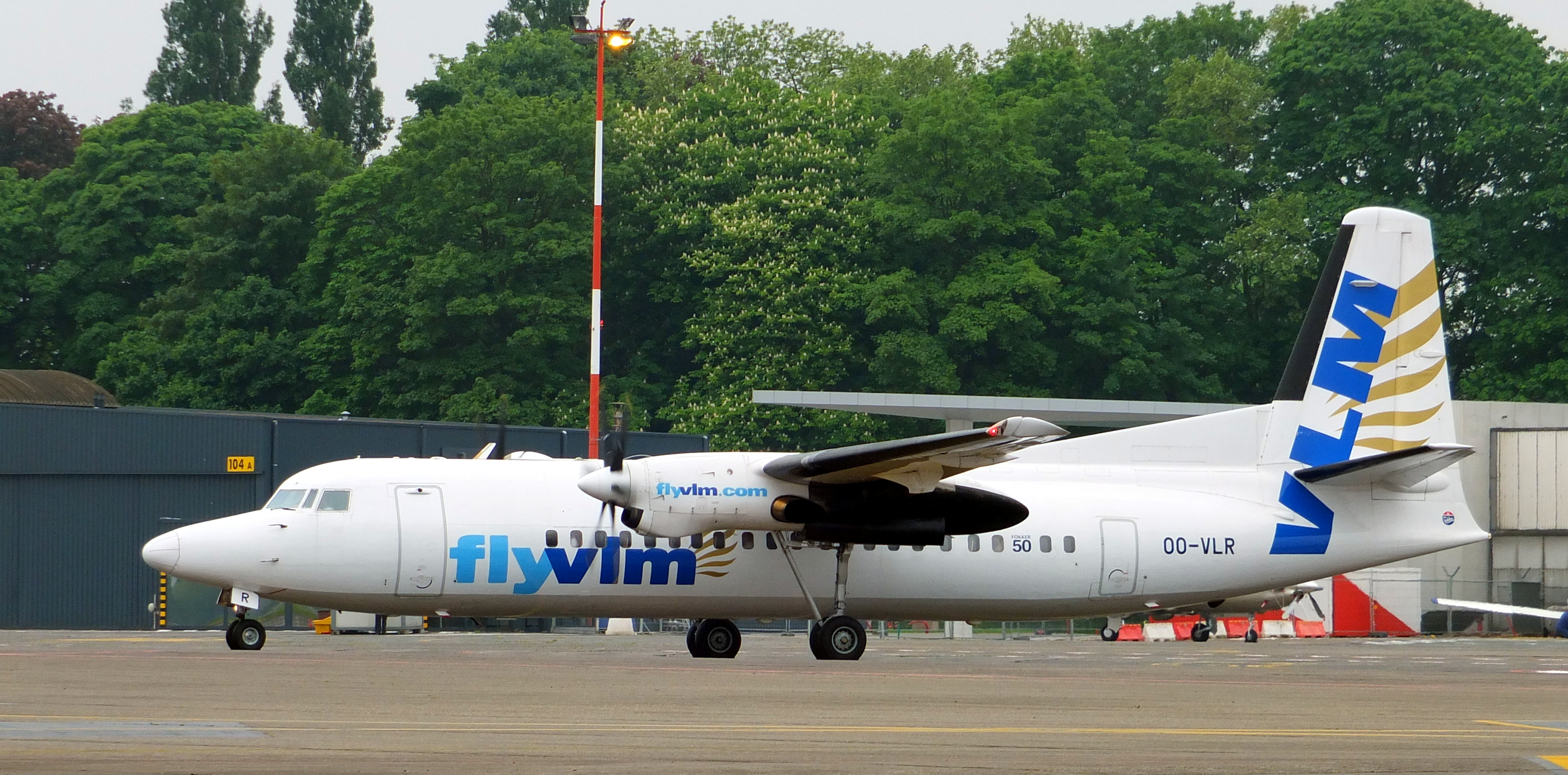 VLM Airlines Fokker 50 OO-VLR (c/n 20121) op Antwerp International Airport, Deurne.